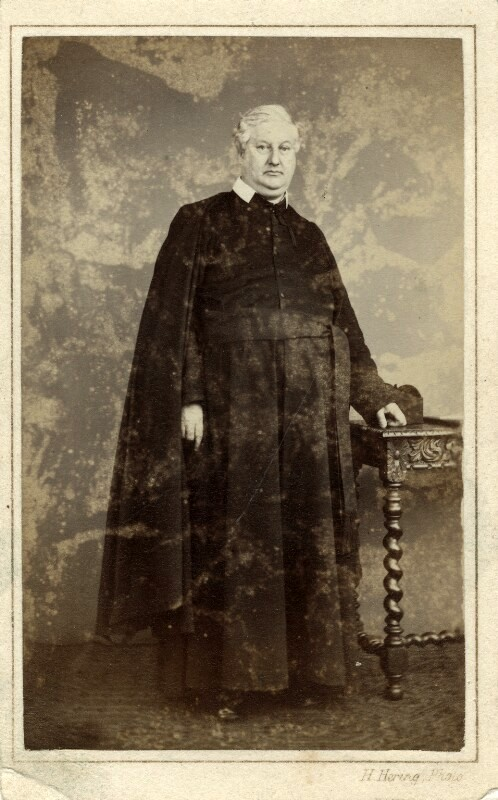 Photograph by Henry Hering